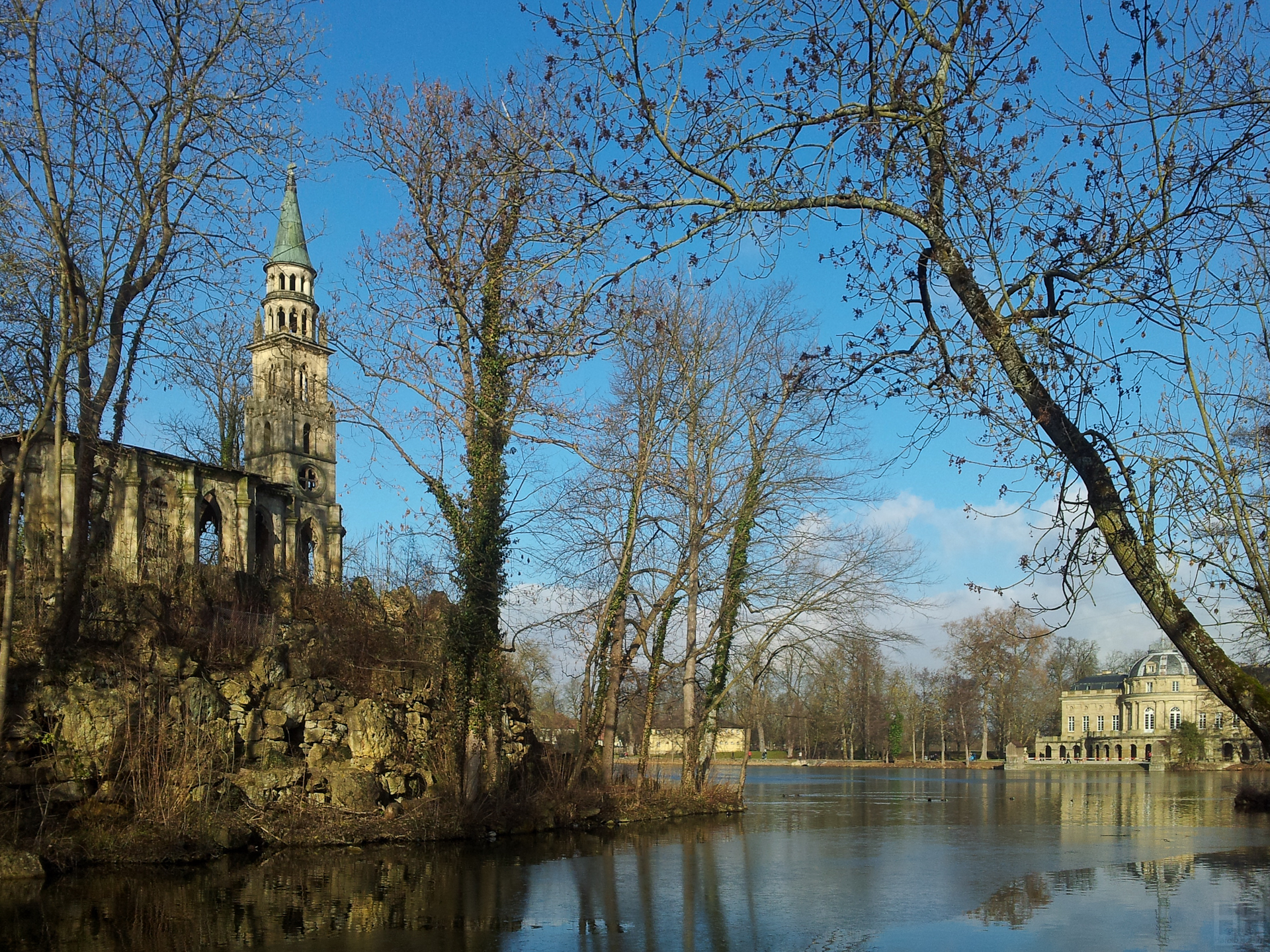 Monrepos